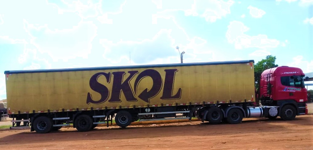 Carreta da cervejaria Skol estacionada no posto Titara na margem da BR-343 no Piauí.